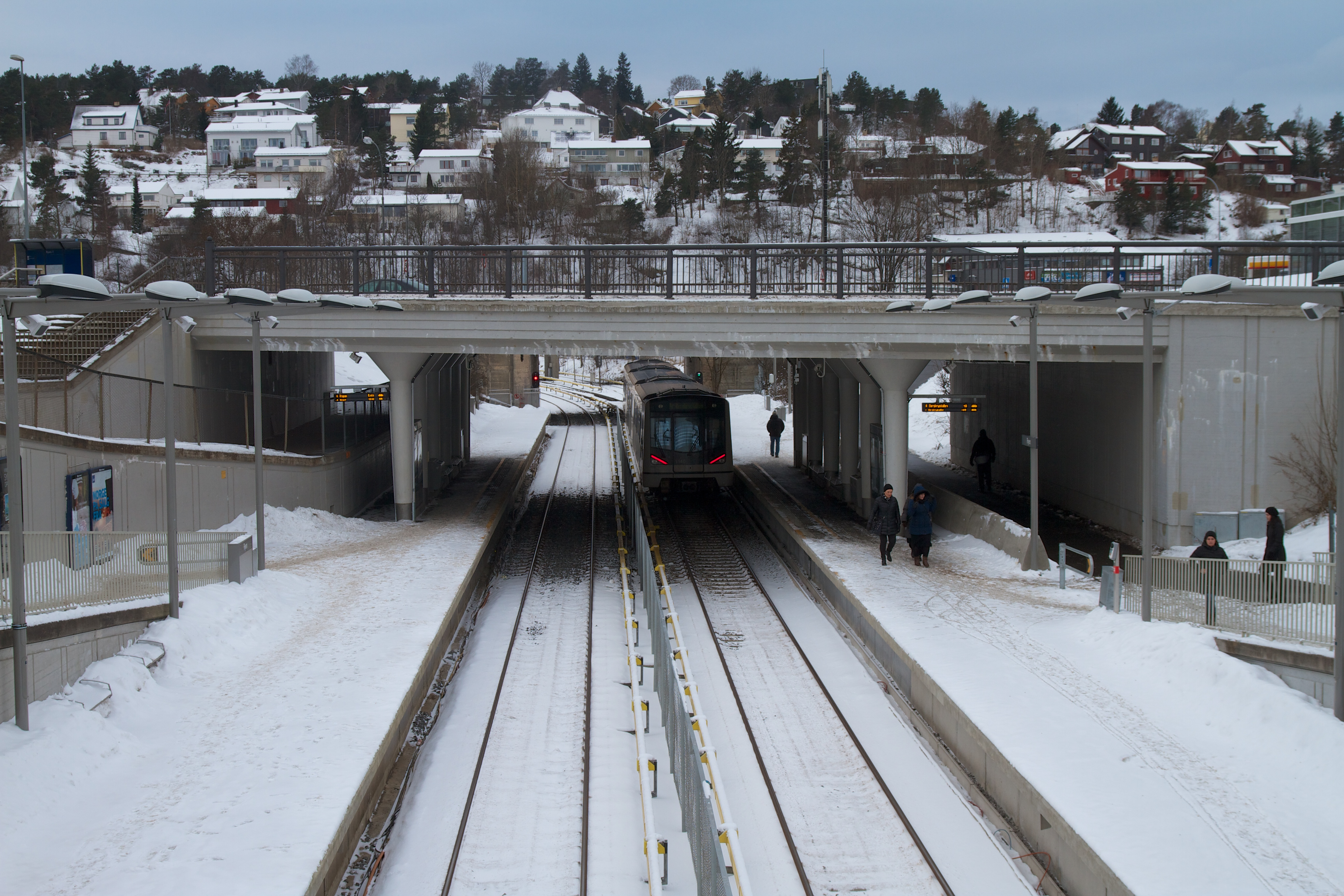 Ryen stasjon